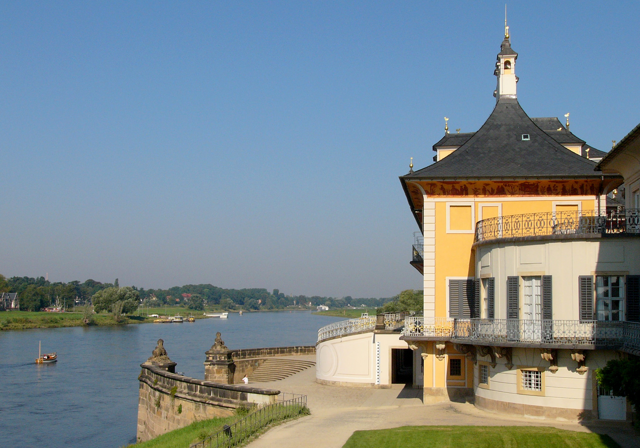 Pillnitz Castle near Dresden, Germany